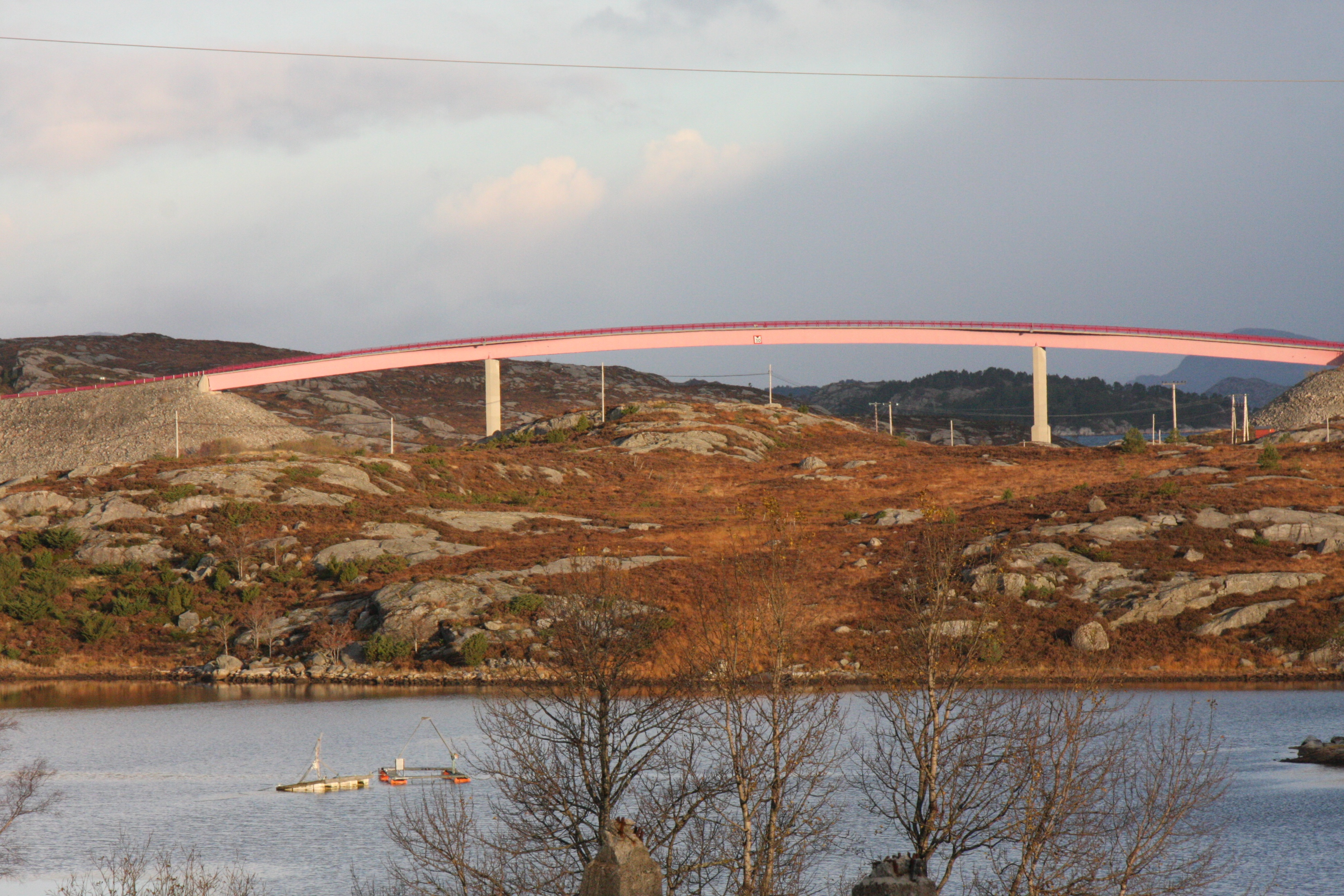 Bilder fra Gulen